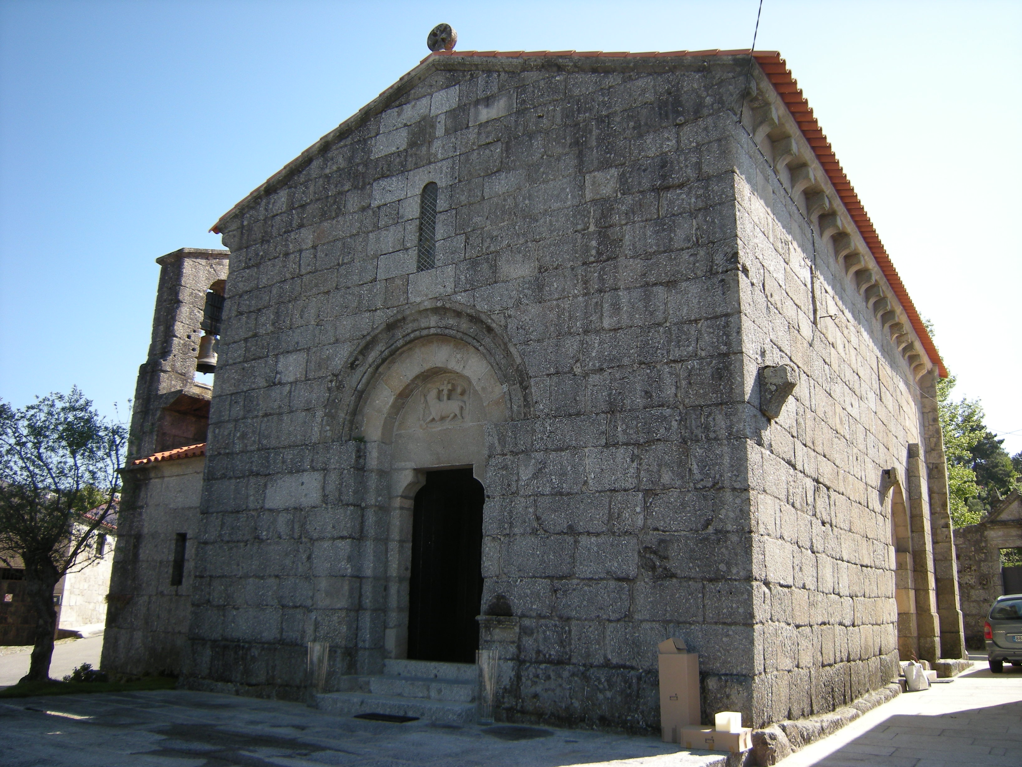 Iglesia de São Romão de Arões, Fafe, Braga, Portugal